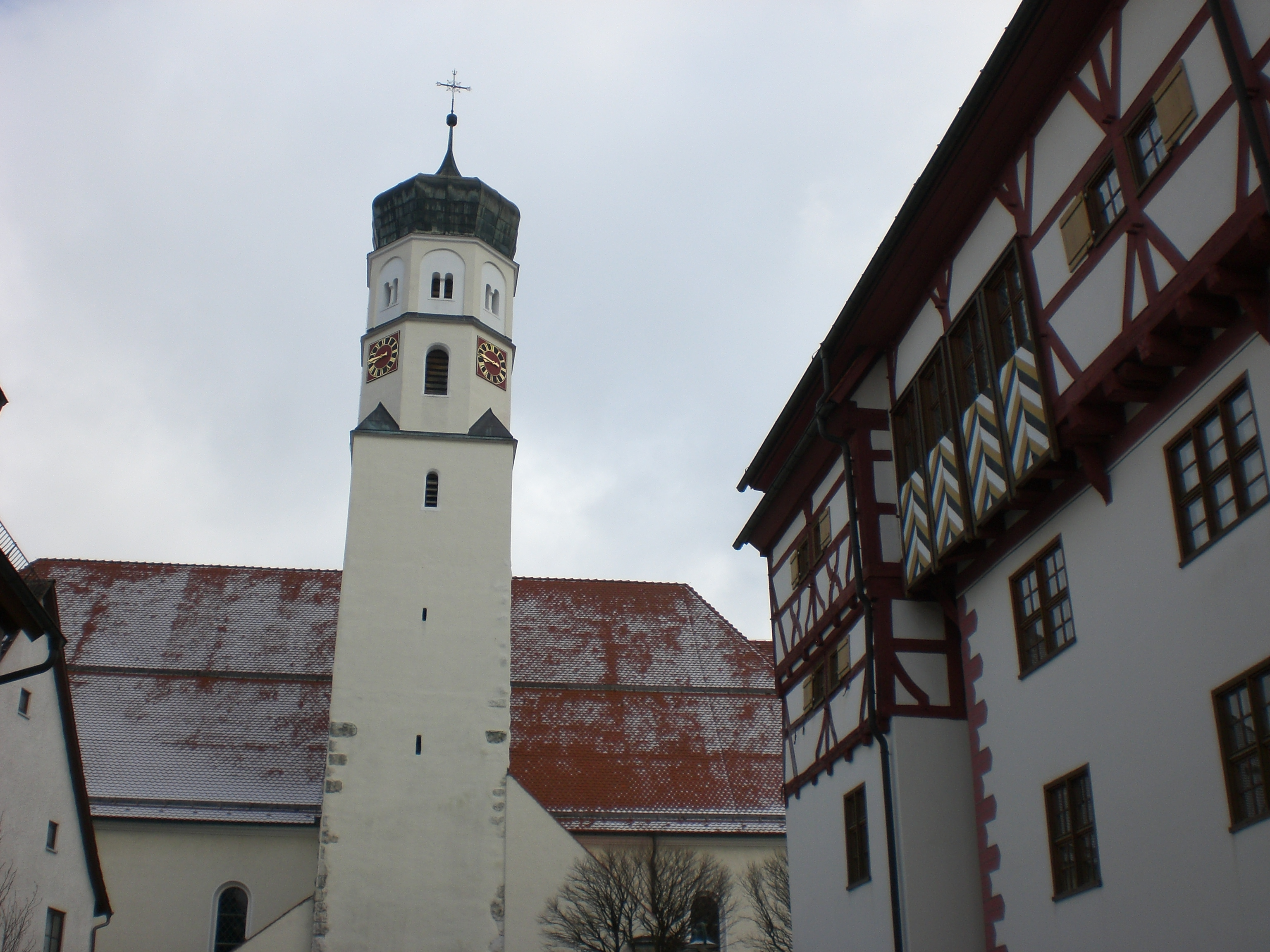 Herz-Jesu-Kirche Schelklingen, Deutschland.